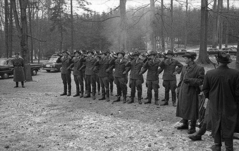 Pakistanischer Staatspräsident Ayoub Khan zu Besuch in Deutschland Vorbereitungen zur Jagd auf Schwarzwild im Saupark Springe (Hannover)